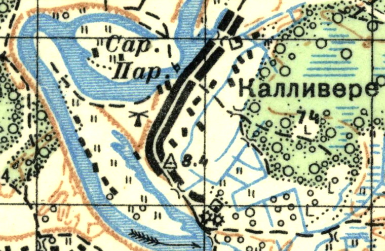 Топографическая карта Ленинградской области, квадрат О-35-21-В (Нарва), деревня Калливере